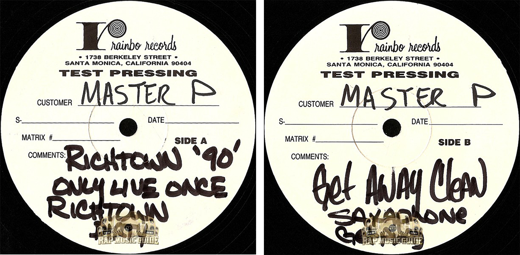 The Master P test pressing of the 1990 extended play (E.P.) Get Away Clean. EP Get Away Clean първо издание от 1990-та , Неиздадено